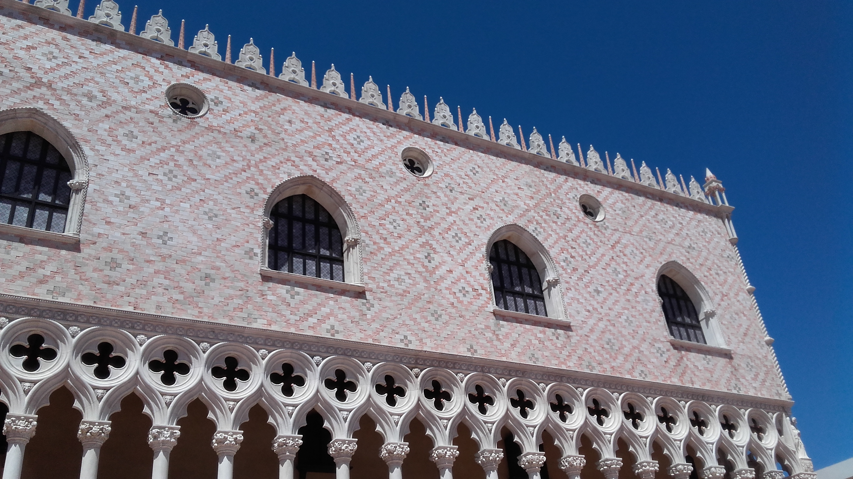 fl